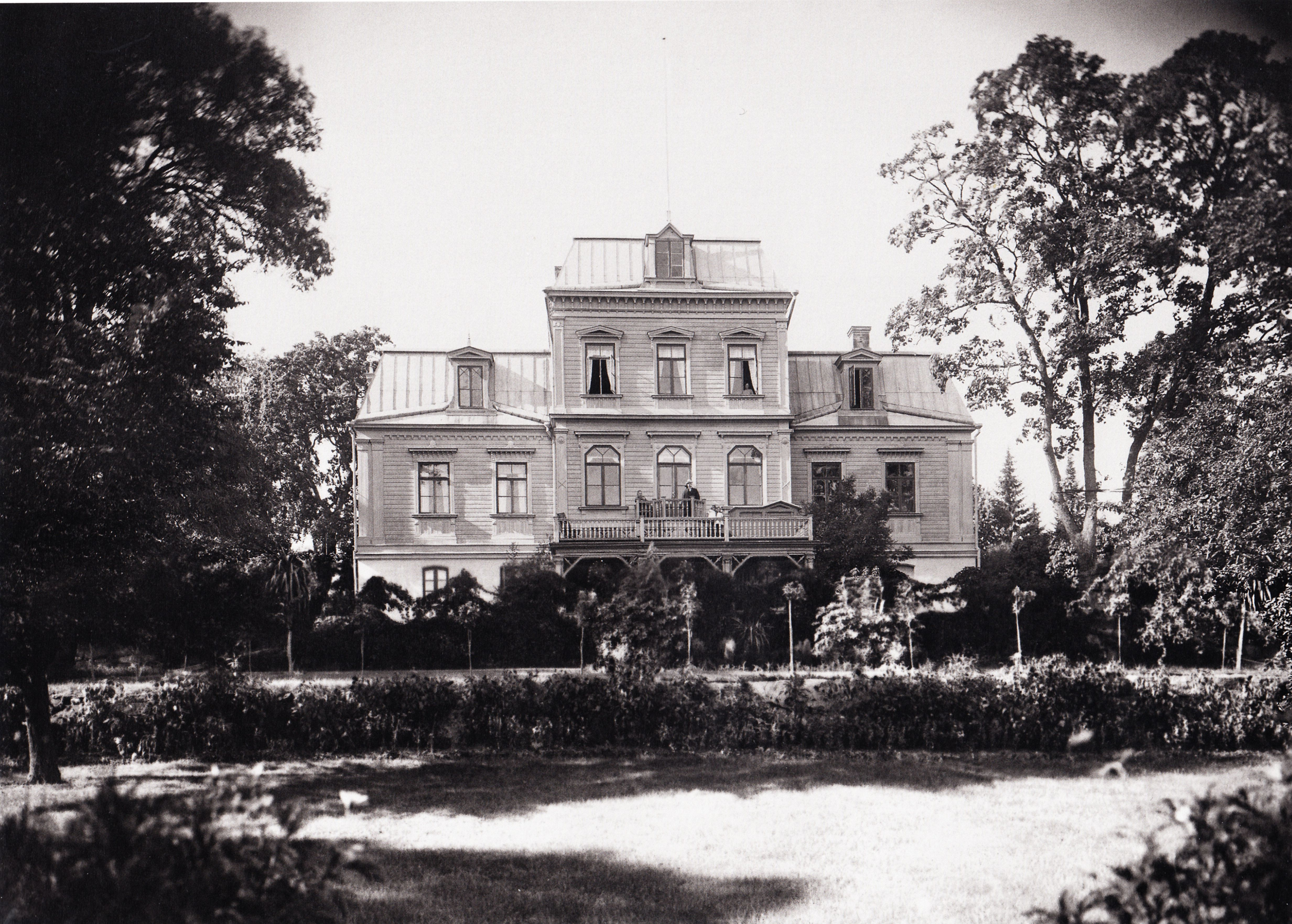 Östersundomin kartano